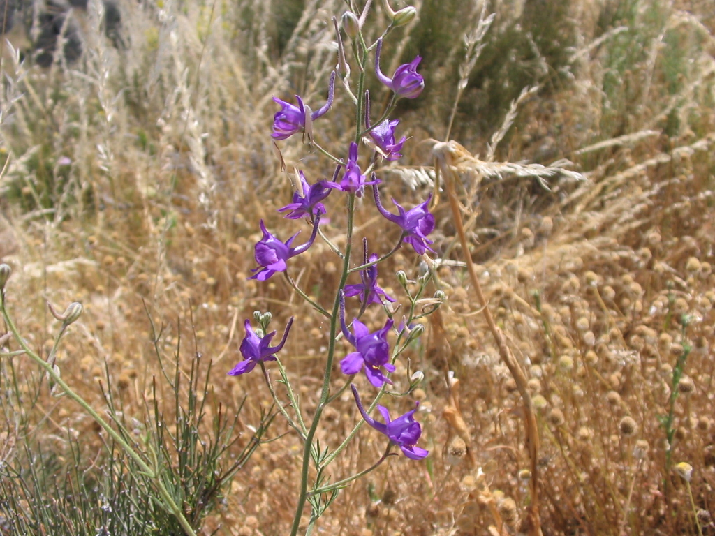 Consolida pubescens diferenciación